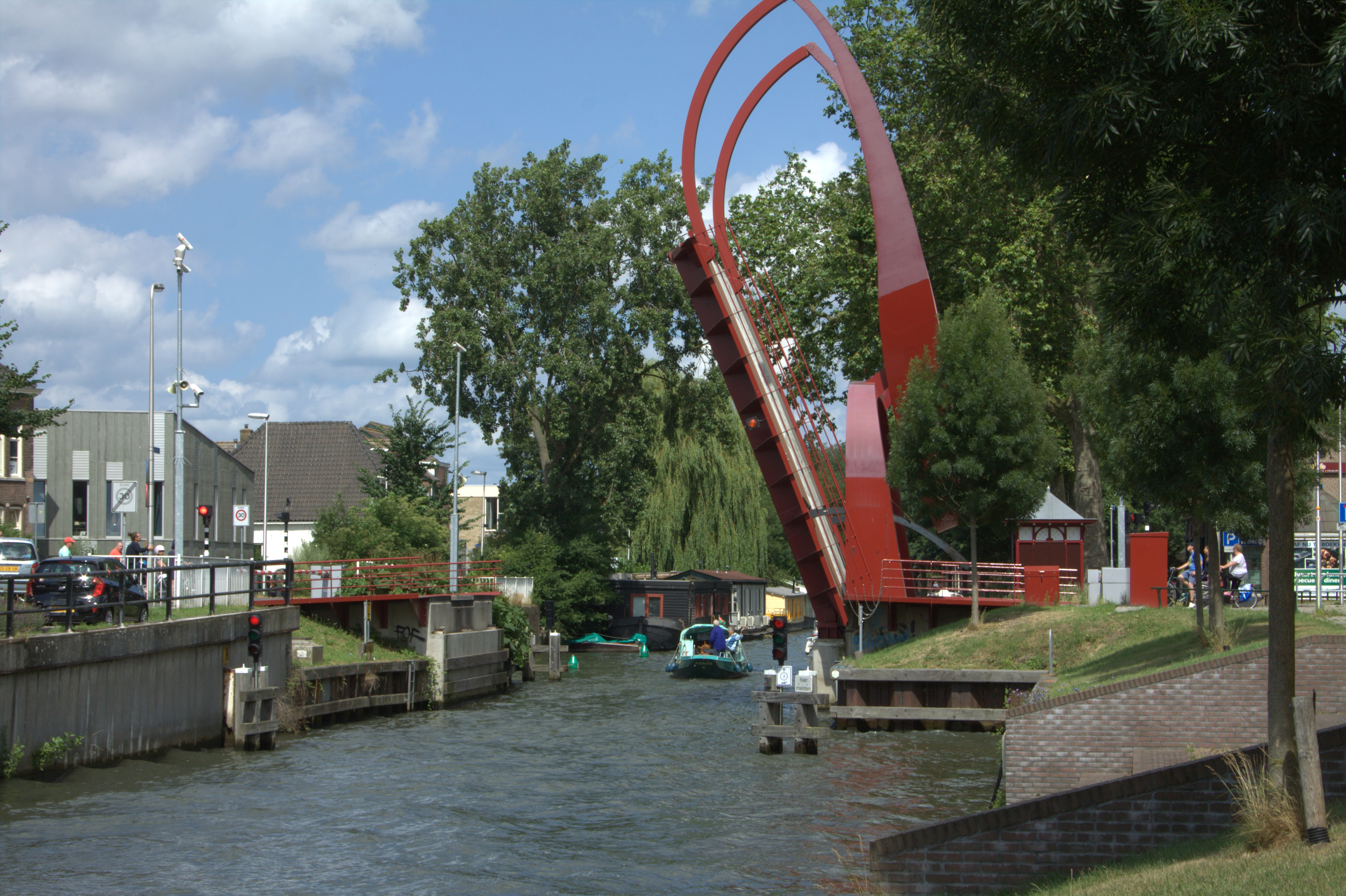 Aan het eind van de Vinkenkade en het begin van de Jagerskade niet ver van het Zandpad zien we De Rode Brug over de rivier De Vecht in Utrecht.